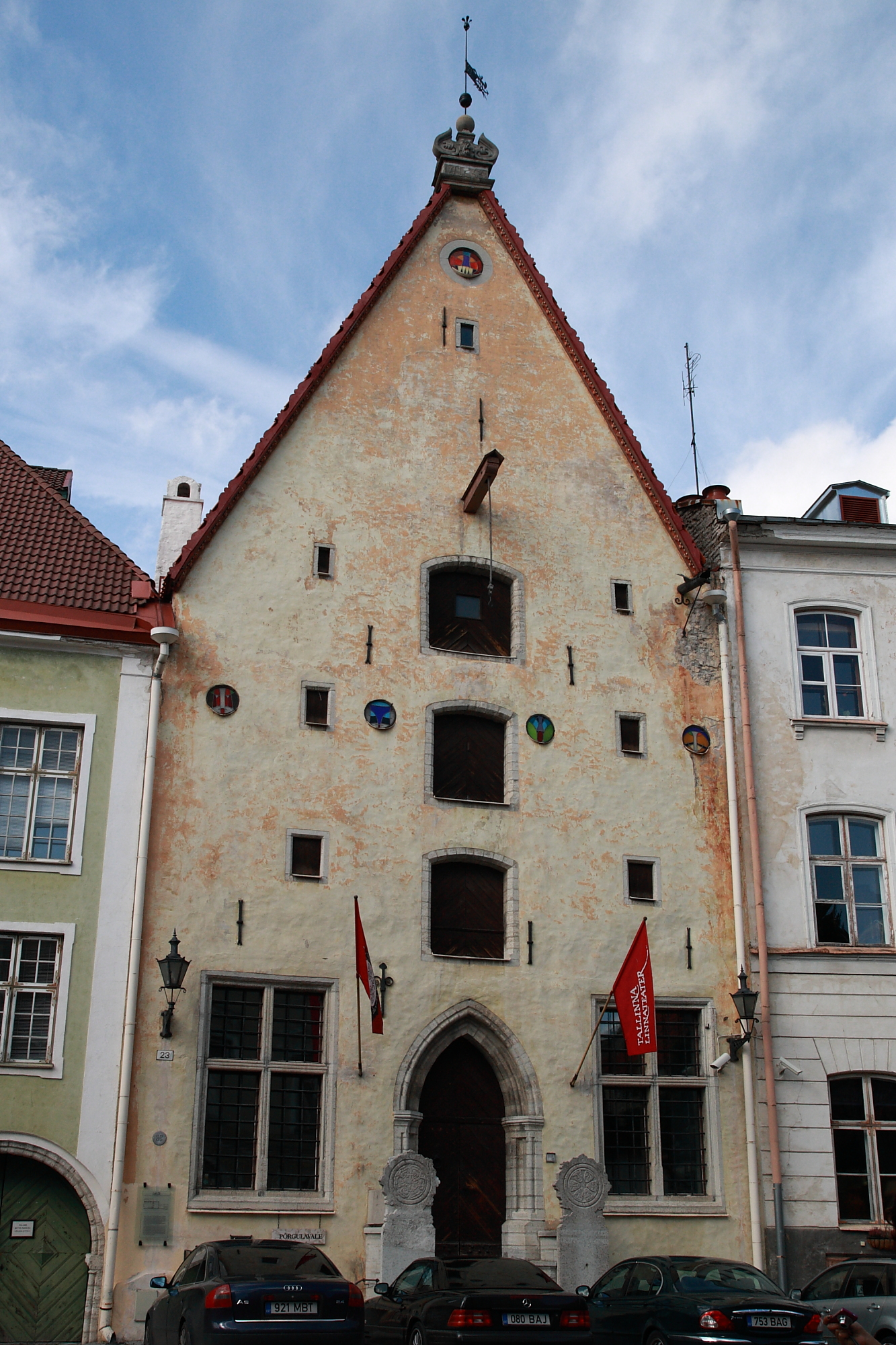 Tallinn, elamu Lai 23 hooviansambliga, 14.-20.saj